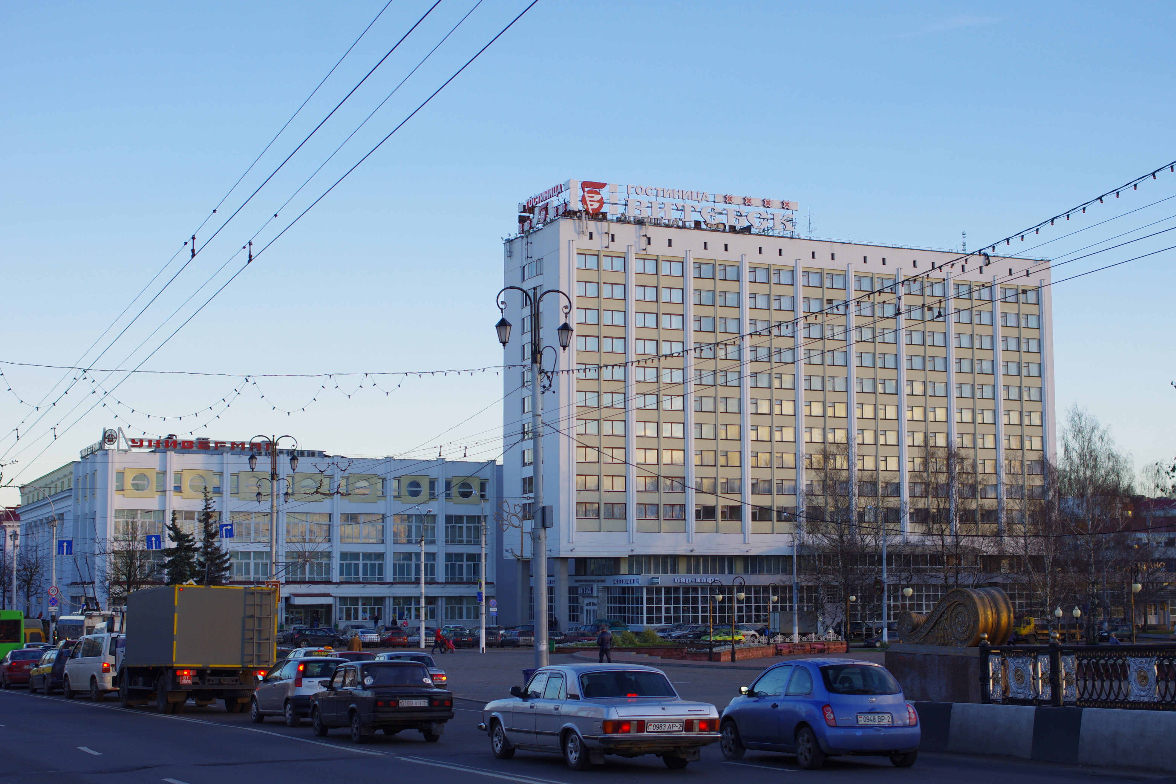 Kastryčnicki rajon, Viciebsk, Belarus